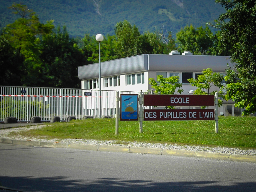 Panneau d'entrée de l'école des pupilles de l'air à Montbonnot, Isère.